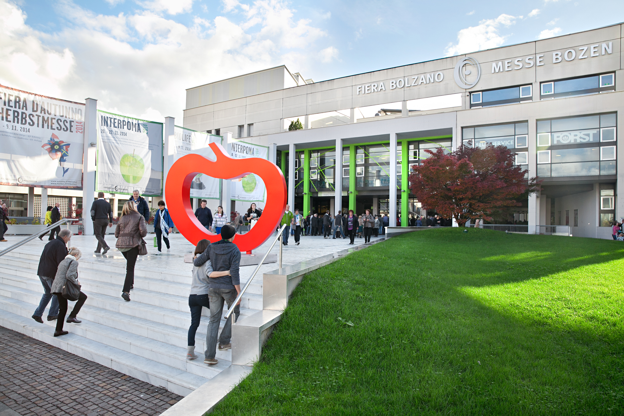 Messe Bozen zählt mehr als 230.000 Besucher pro Jahr.